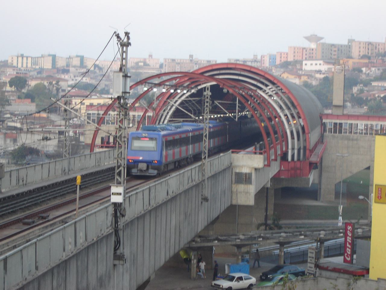 Line EL Expresso Leste East Express CPTM